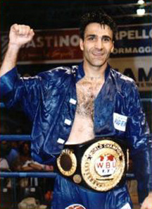 Piccirillo campione del mondo WBU